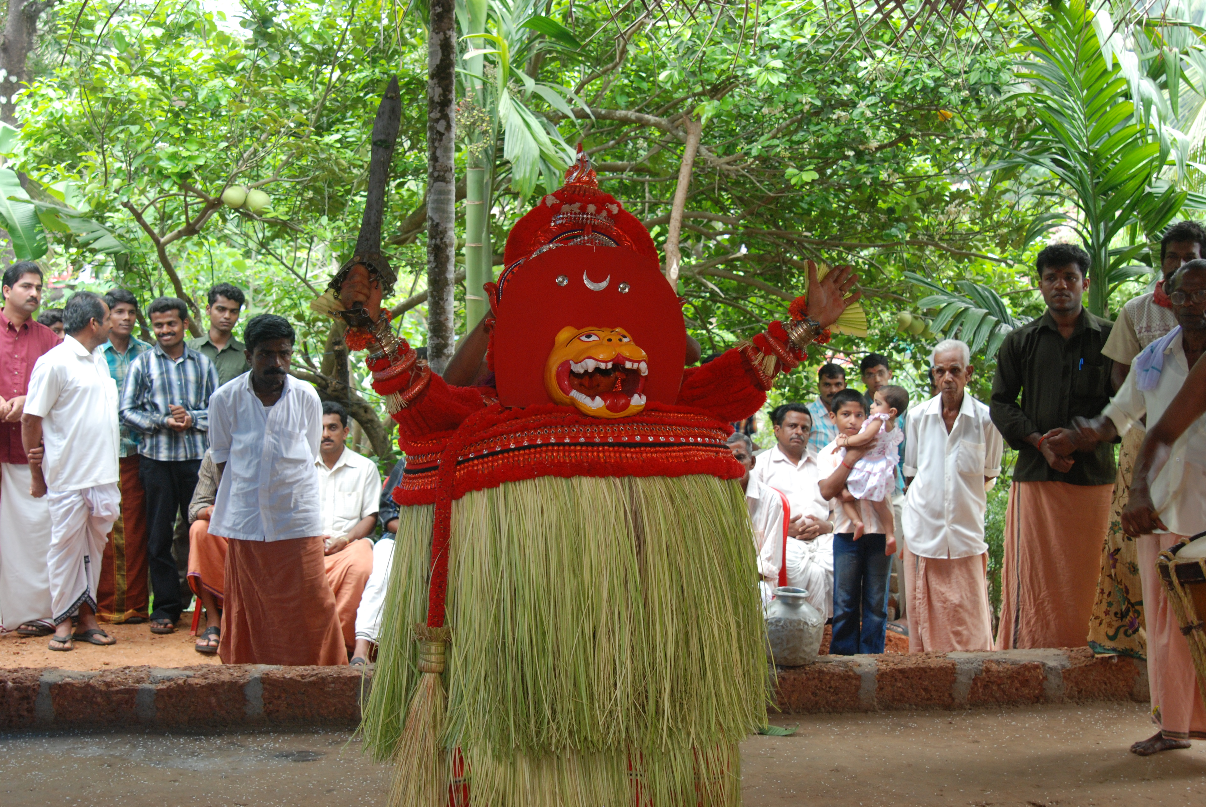 നരസിംഹമായി അവതരിക്കുന്ന വിഷ്ണുമൂർത്തി തെയ്യം